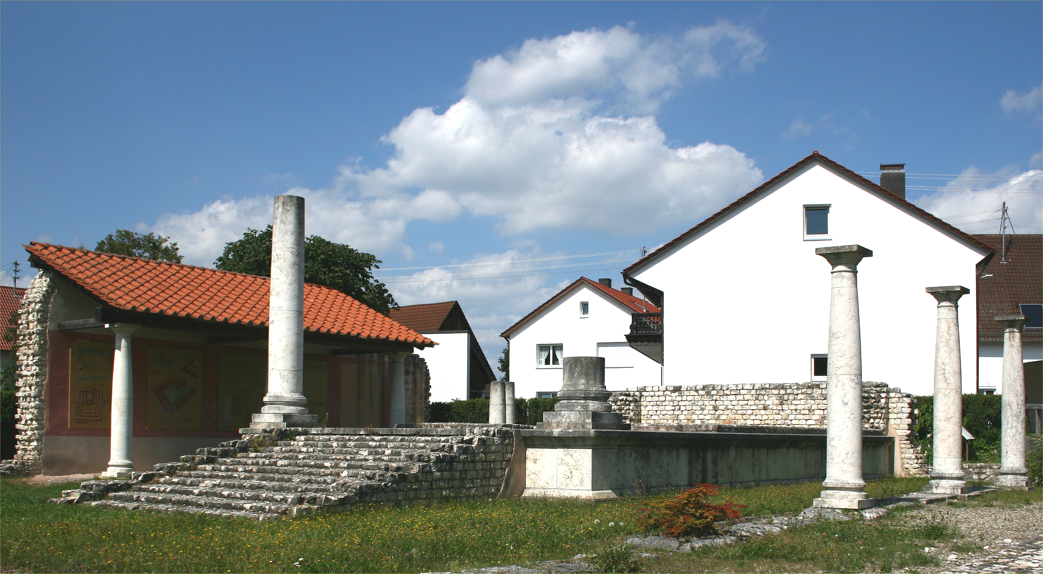 Apollo-Grannus-Tempel (Teilrekonstruktion) in Lauingen-Faimingen im Landkreis Dillingen